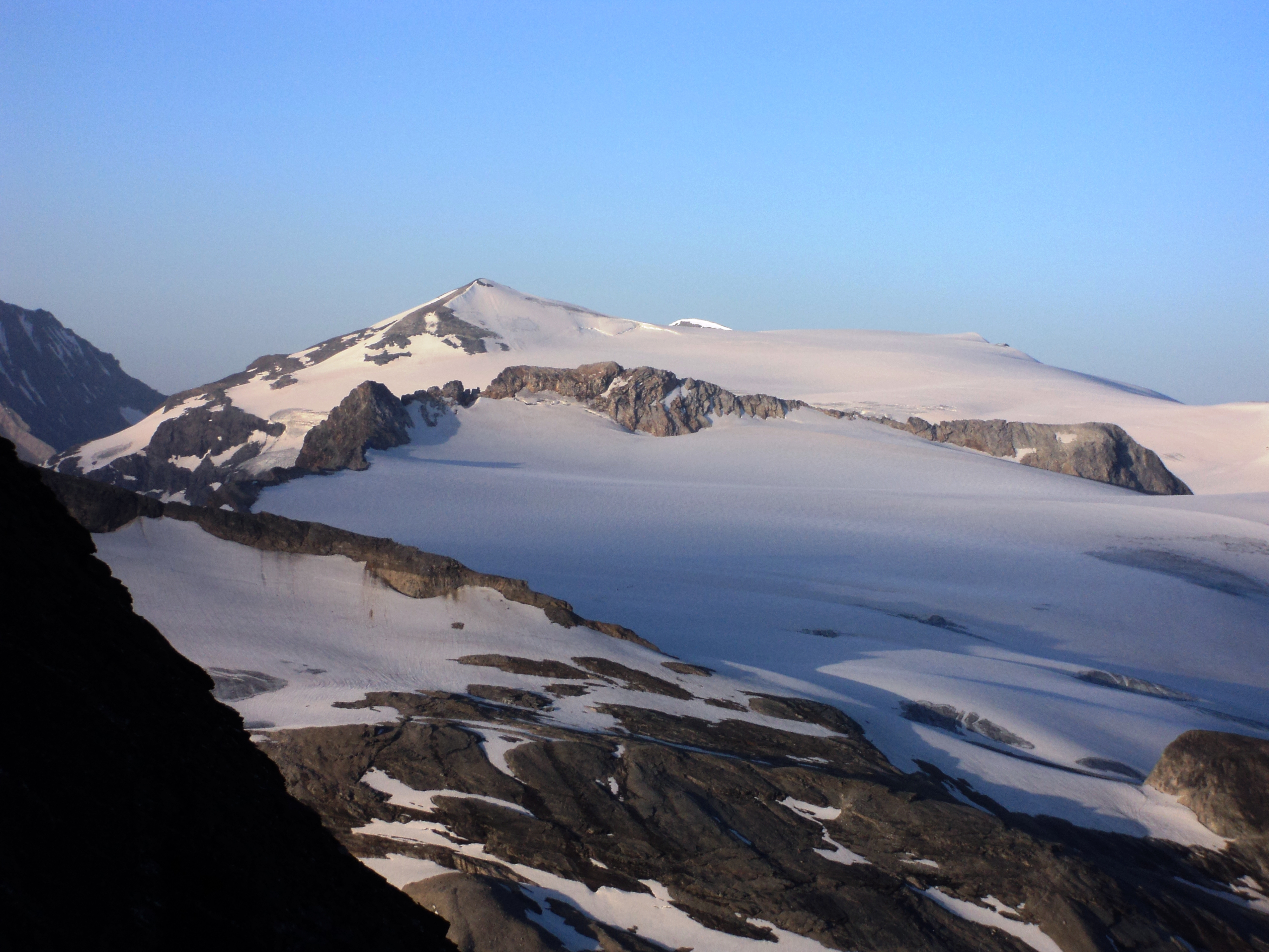 Il Dôme de Chasseforêt visto salendo la via normale alla Grande Casse